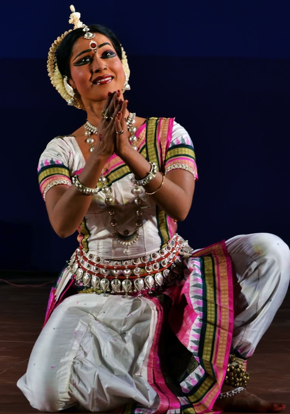 ഒഡീസി നര്‍ത്തകി